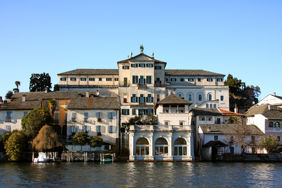 Abbazia Mater Ecclesiae sull'Isola di San Giulio, Lago d'Orta, Novara.